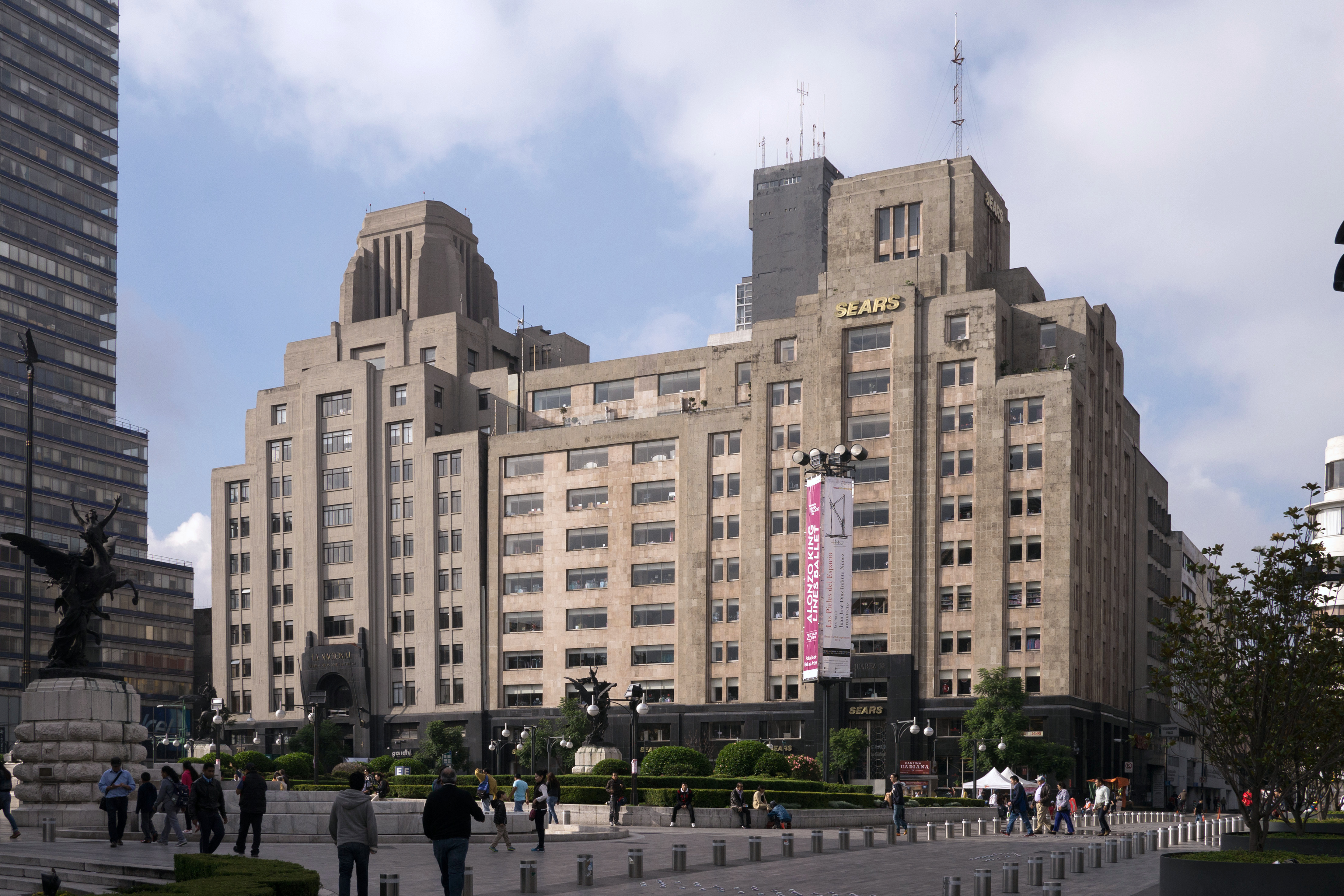 Mexico df - Edificio La Nacional